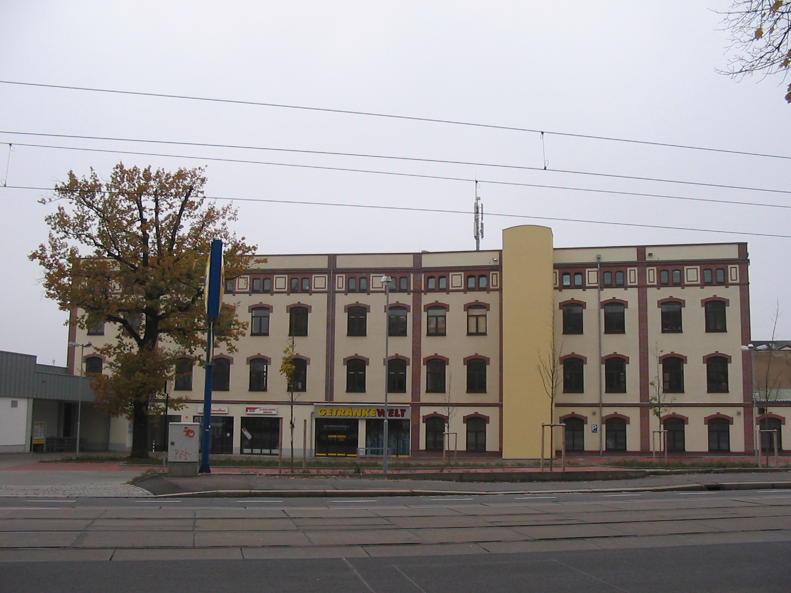 Radebeul, Sächsische Asbestfabrik Thoenes, Meißner Straße